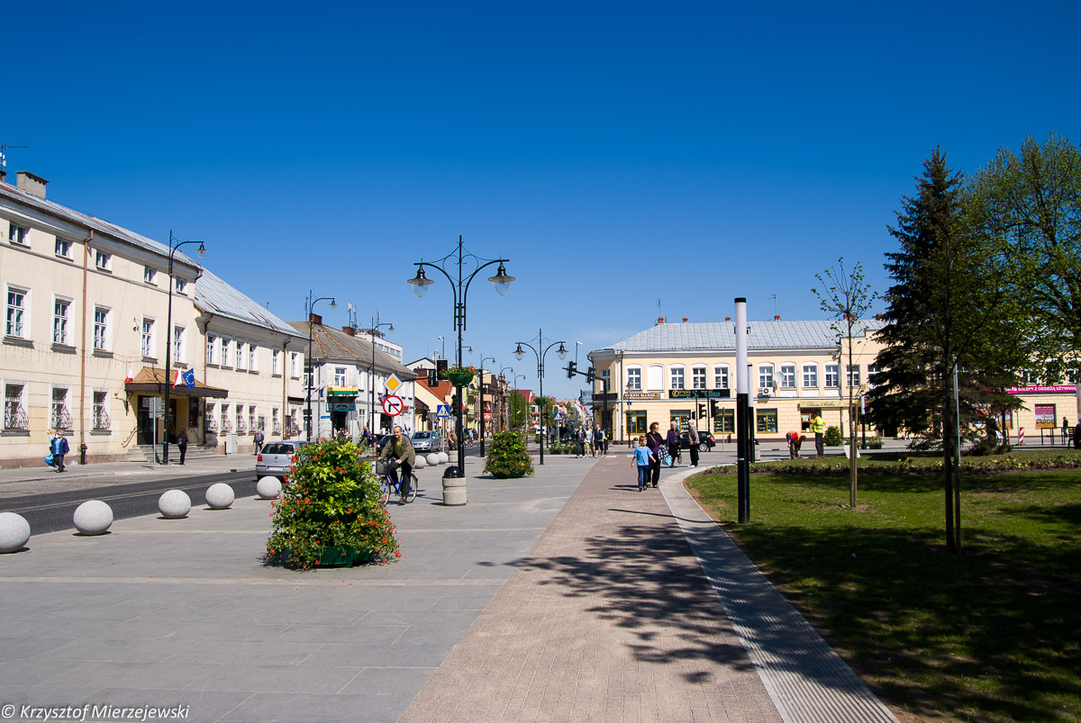 ul. T. Noniewicza